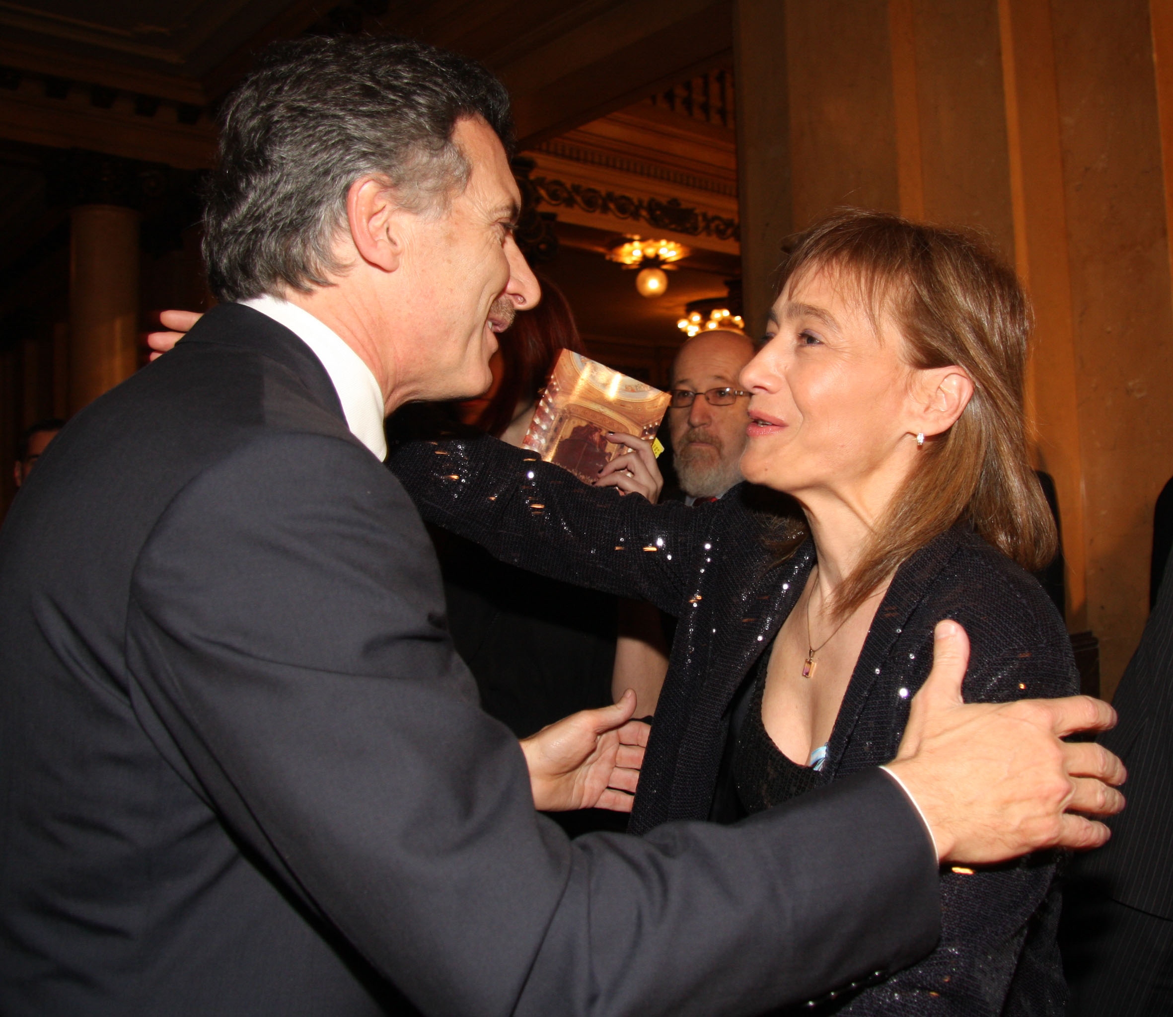 Gala de reapertura del Teatro Colón. Mauricio Macri con la Gobernadora de Tierra del Fuego, Fabiana Ríos.